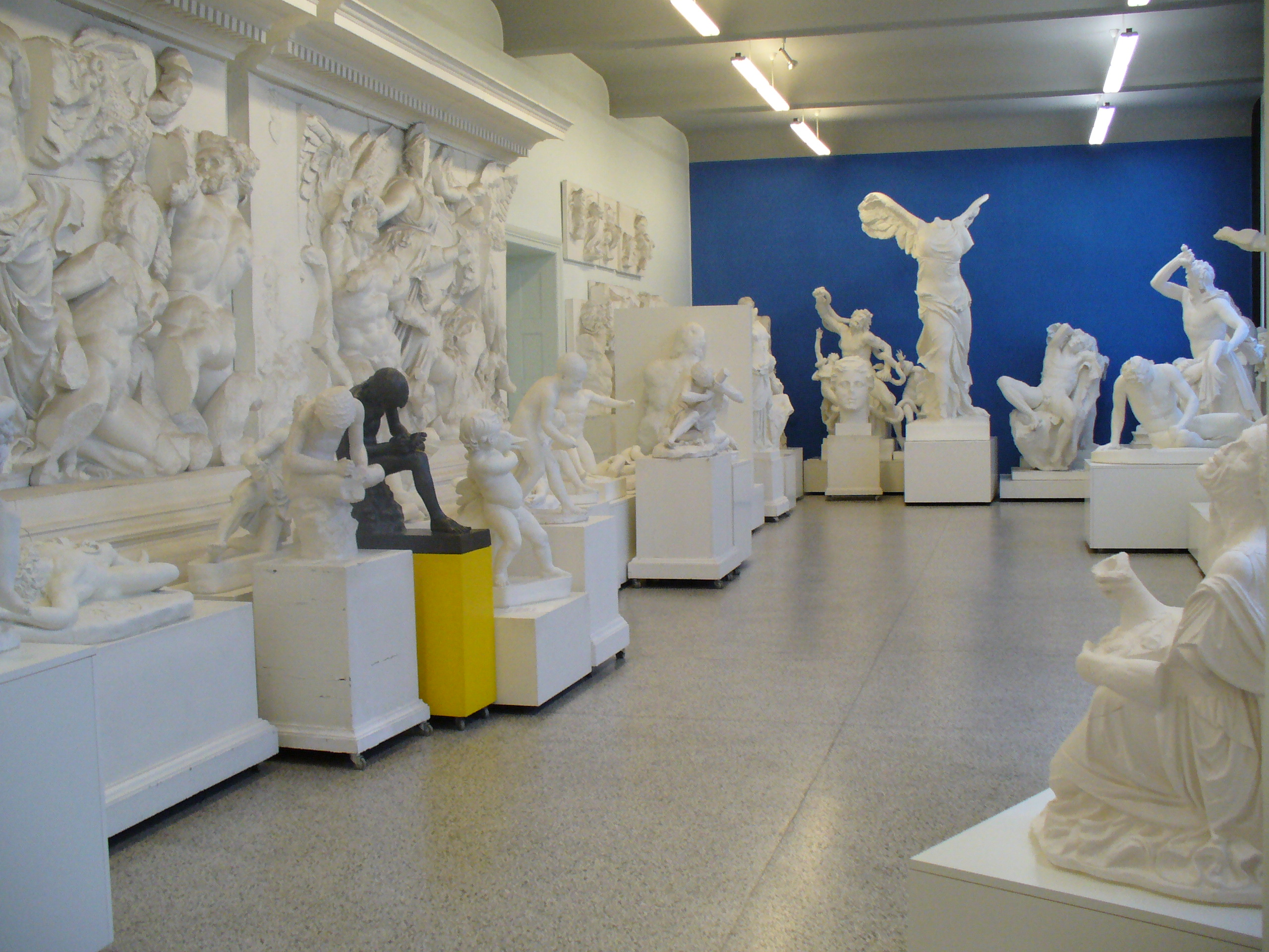 Blick in die Abgusssammlung des Archäologischen Instituts der Georg-August-Universität Göttingen, Saal der Hellenistischen Skulpturen.